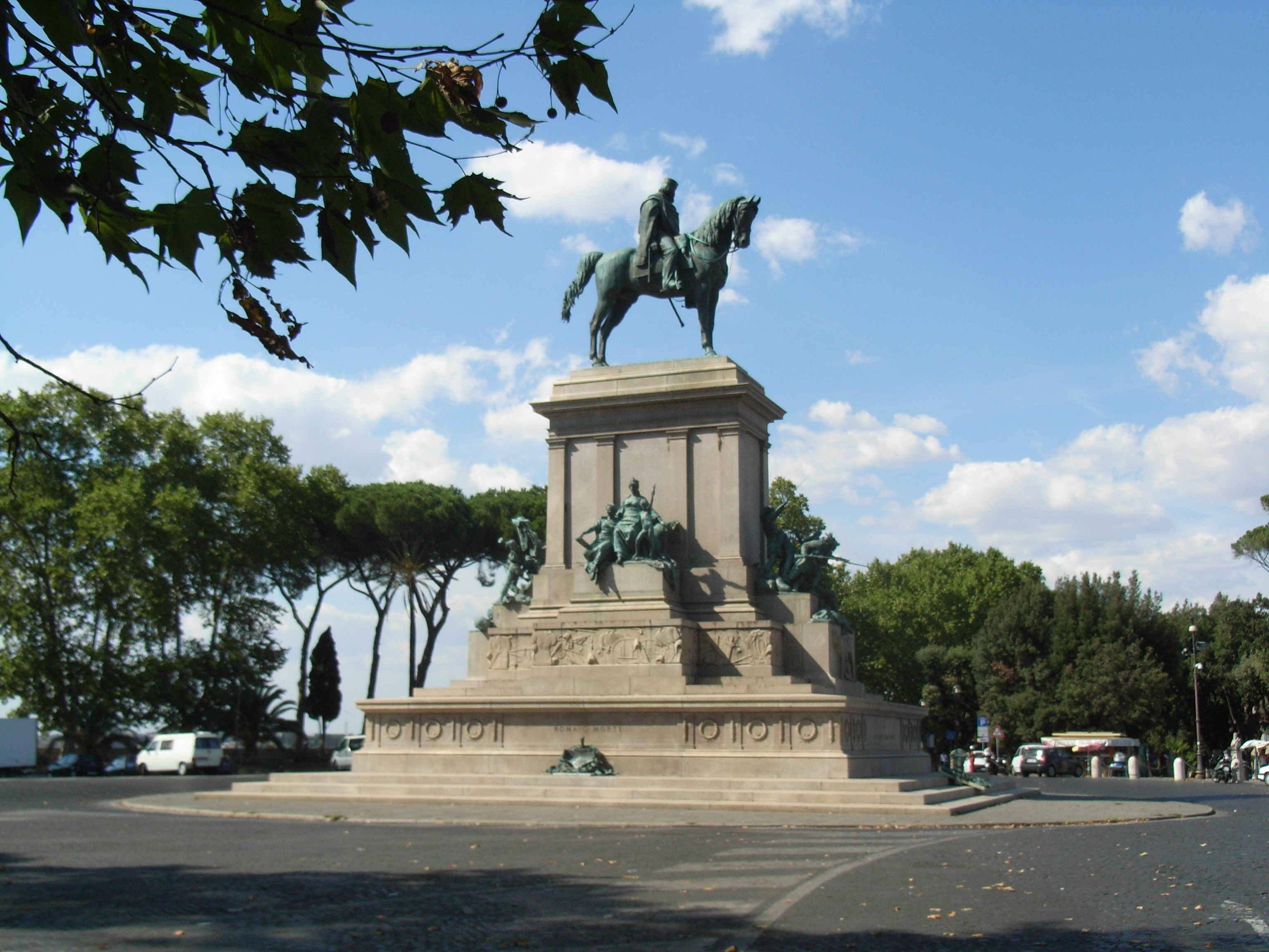 Garibaldi Monument Rome